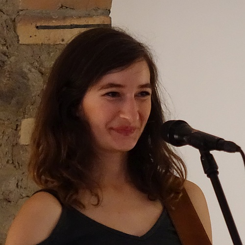 Eva Croissant mit Band bei einem Wohnzimmerkonzert am 23. Mai 2018